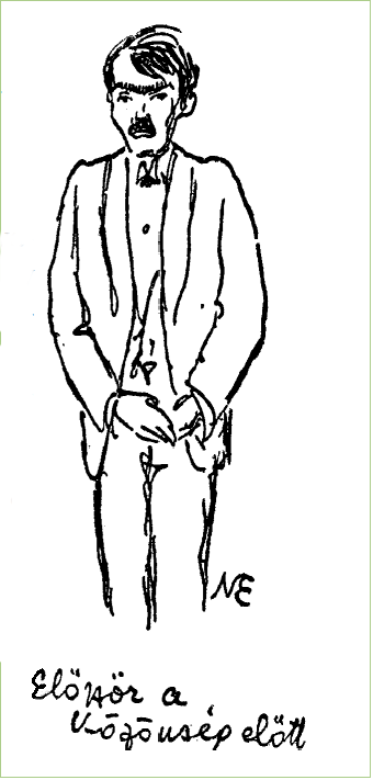 Nagy Endre rajza saját magáról A kabaré című regényében.